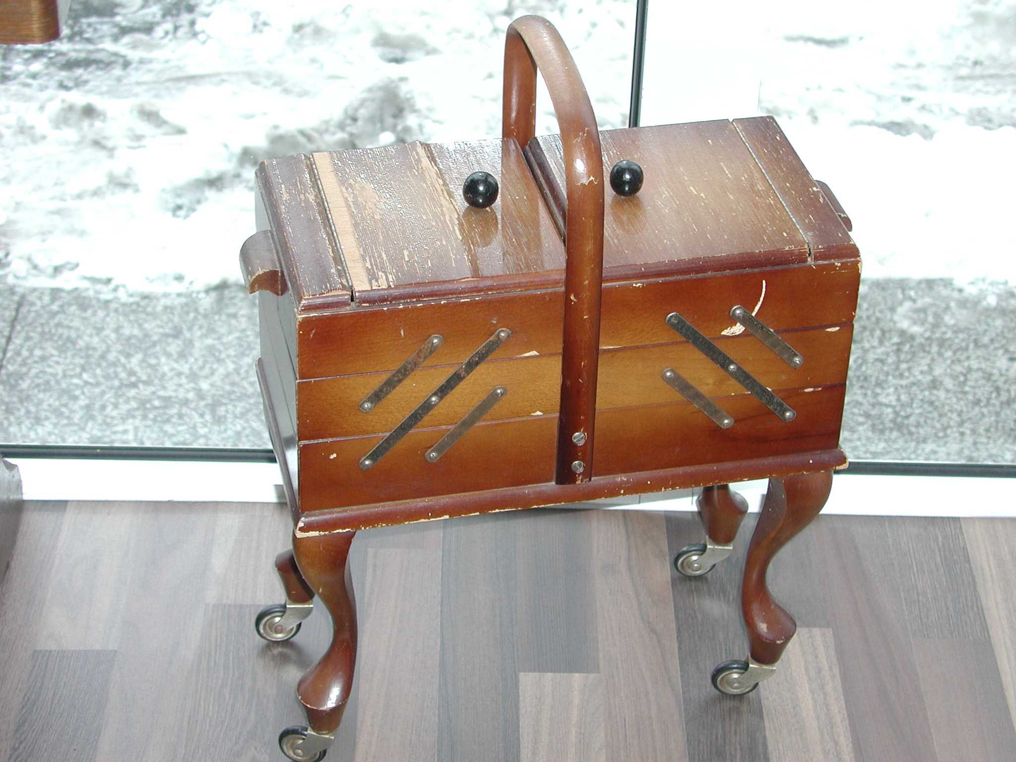 Nähkästchen fahrbar, Aufgenommen mit Olympus SP800UZ